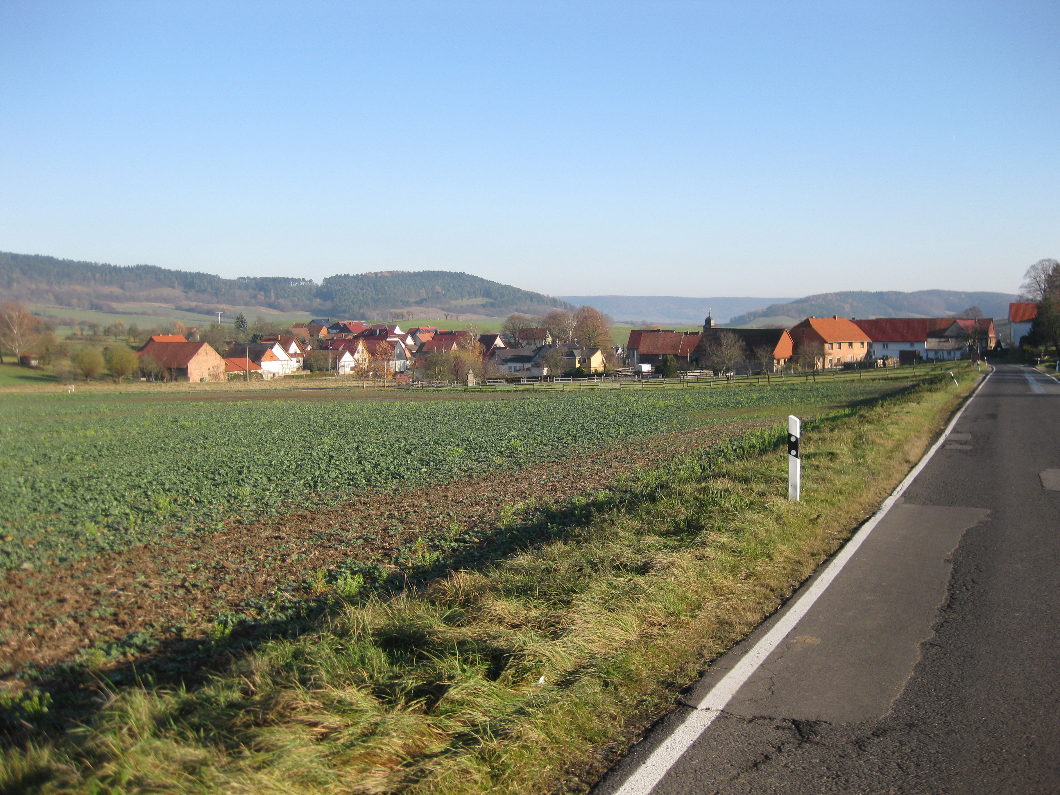 Ansicht auf Schwobfeld von Westen (im Hintergrund der Höheberg (ganz li),der Hüneberg (li), der Schimberg (mi im Hintergrund) und die Siebertsburg (re))